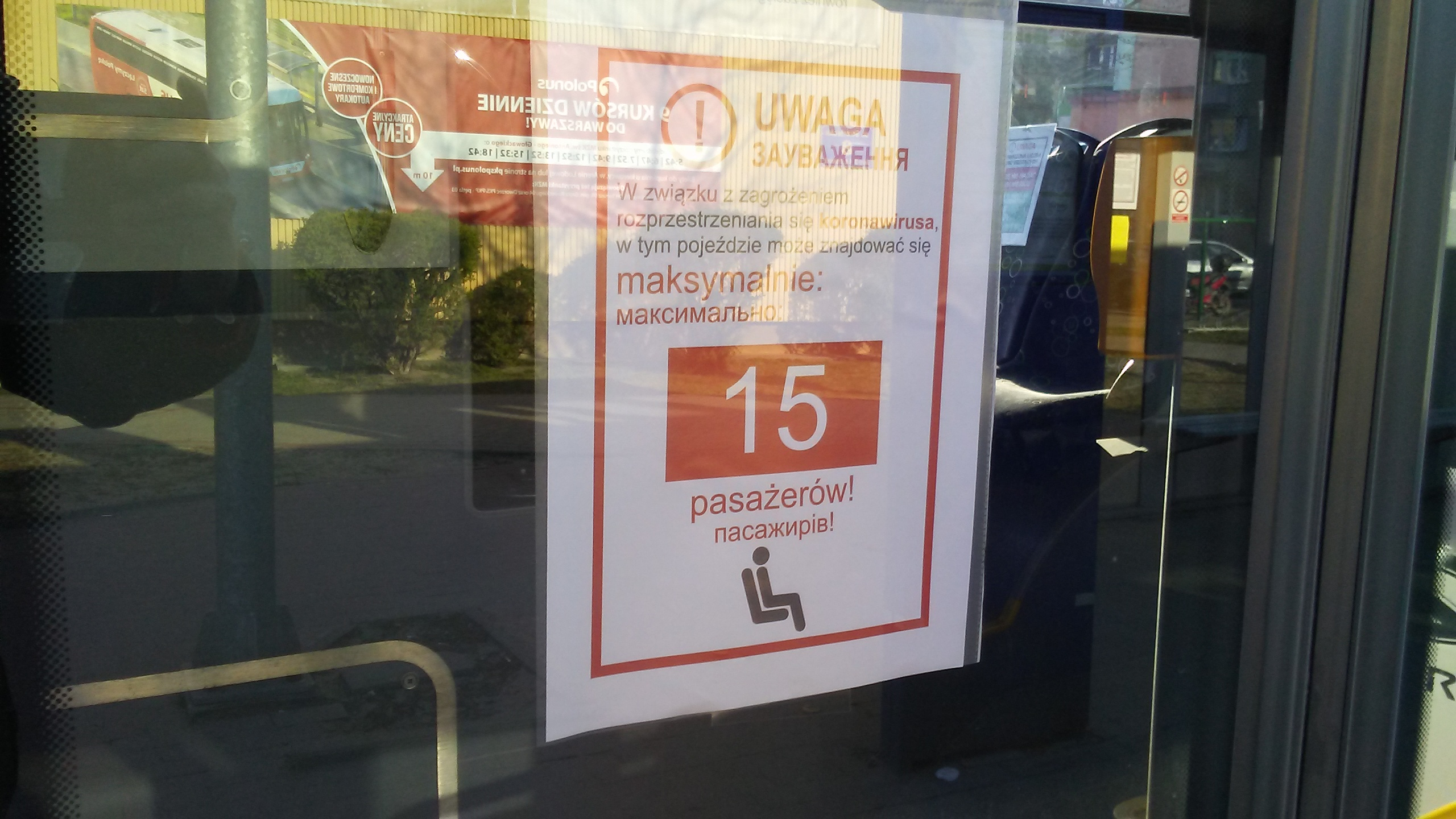 COVID-19 Komunikat o limicie pasażerów którzy mogą przebywać w autobusie bezpłatnej komunikacji miejskiej w 60-tysięcznym Tomaszowie Mazowieckim, w wojeództwie łódzkim